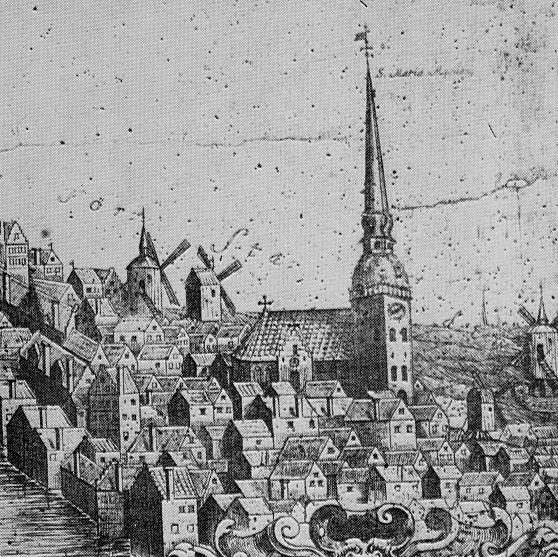 Maria Magdalena kyrka från väster och begyggelsen däromkring. Detalj av Johan Sasses kopparstick 1650-52.